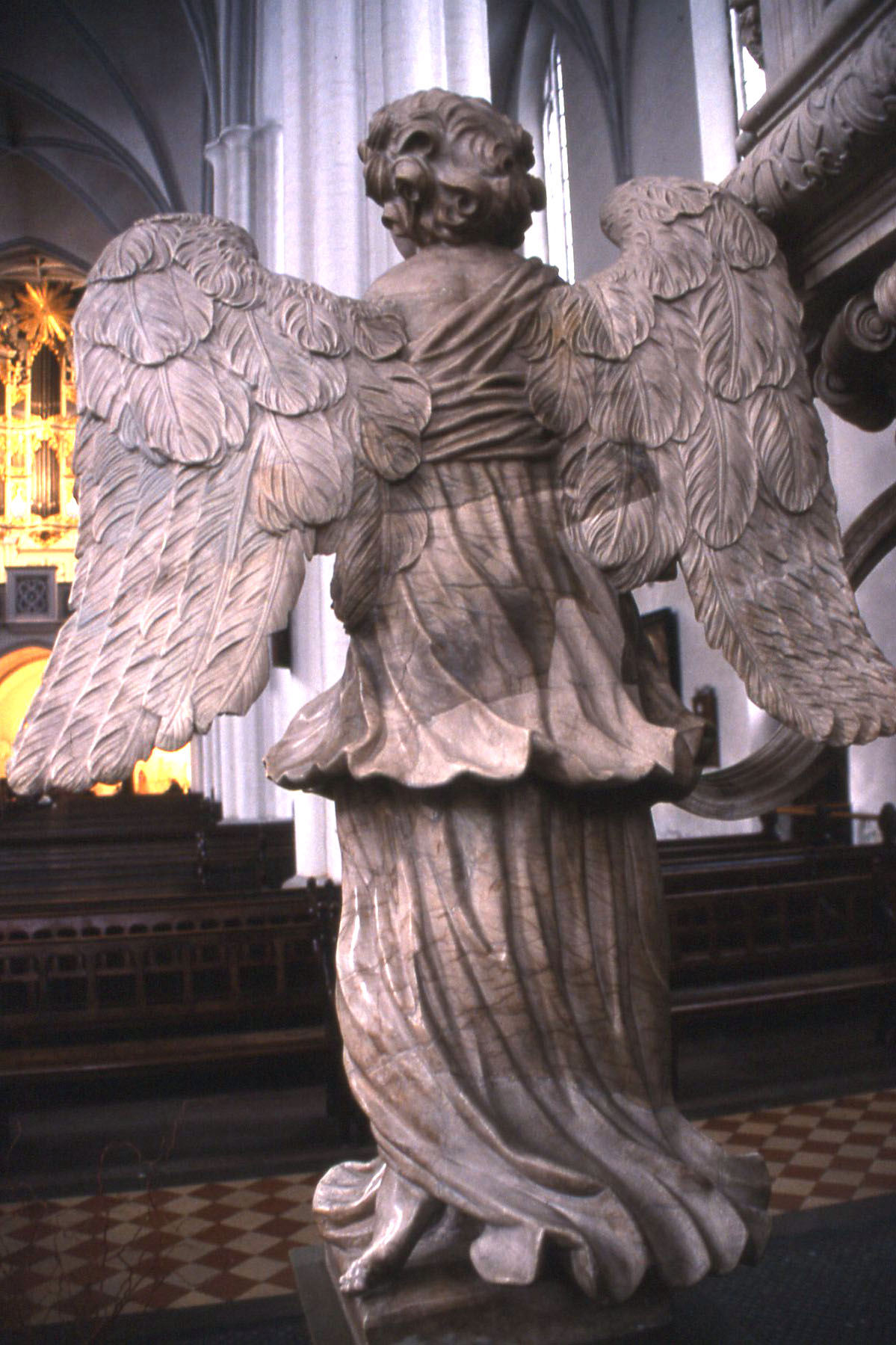 Engel von Andreas Schlüter